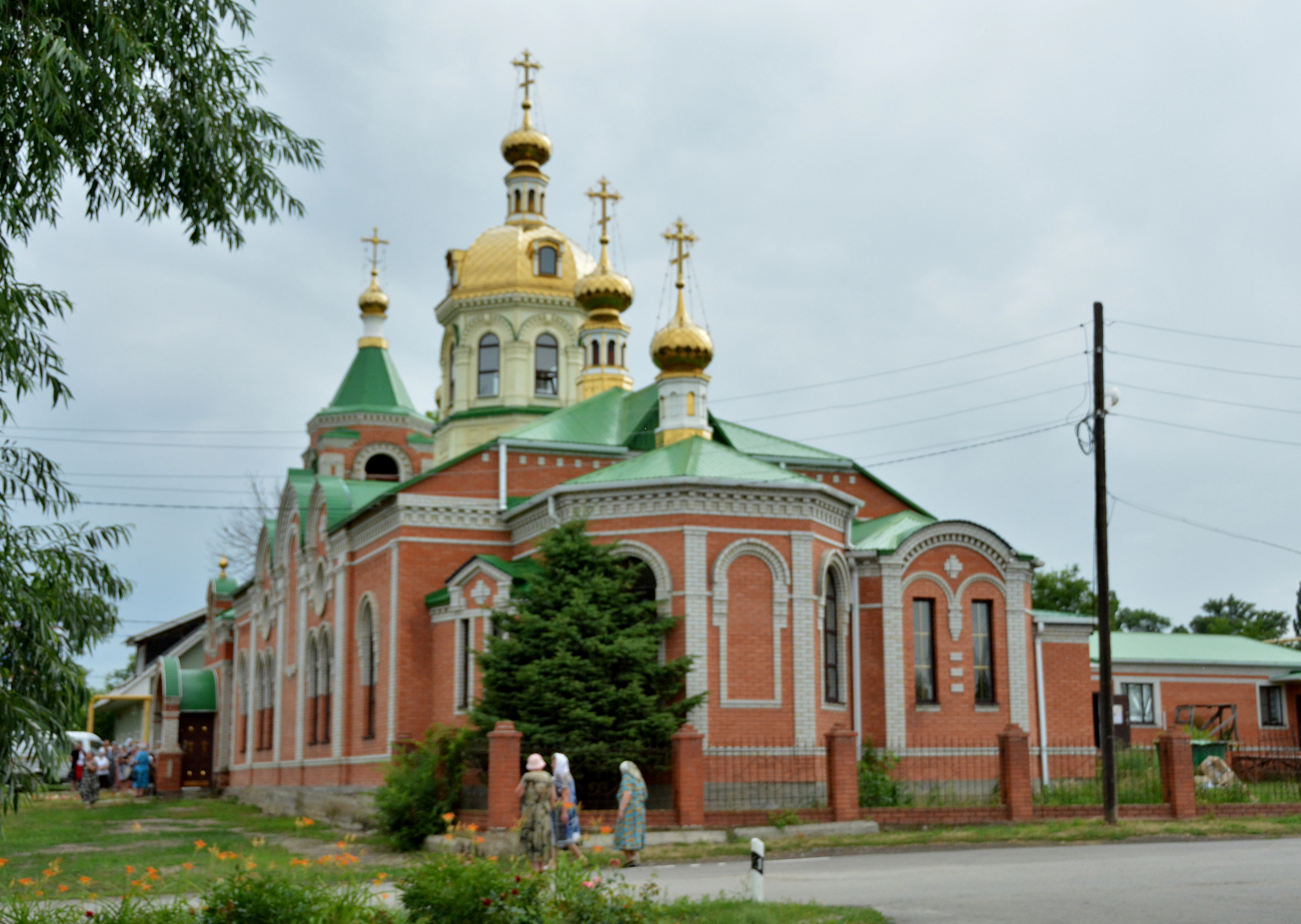 Храм Державной иконы Божией Матери в городе Донецке Ростовской области.